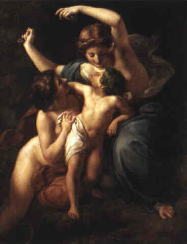 allegoric motive